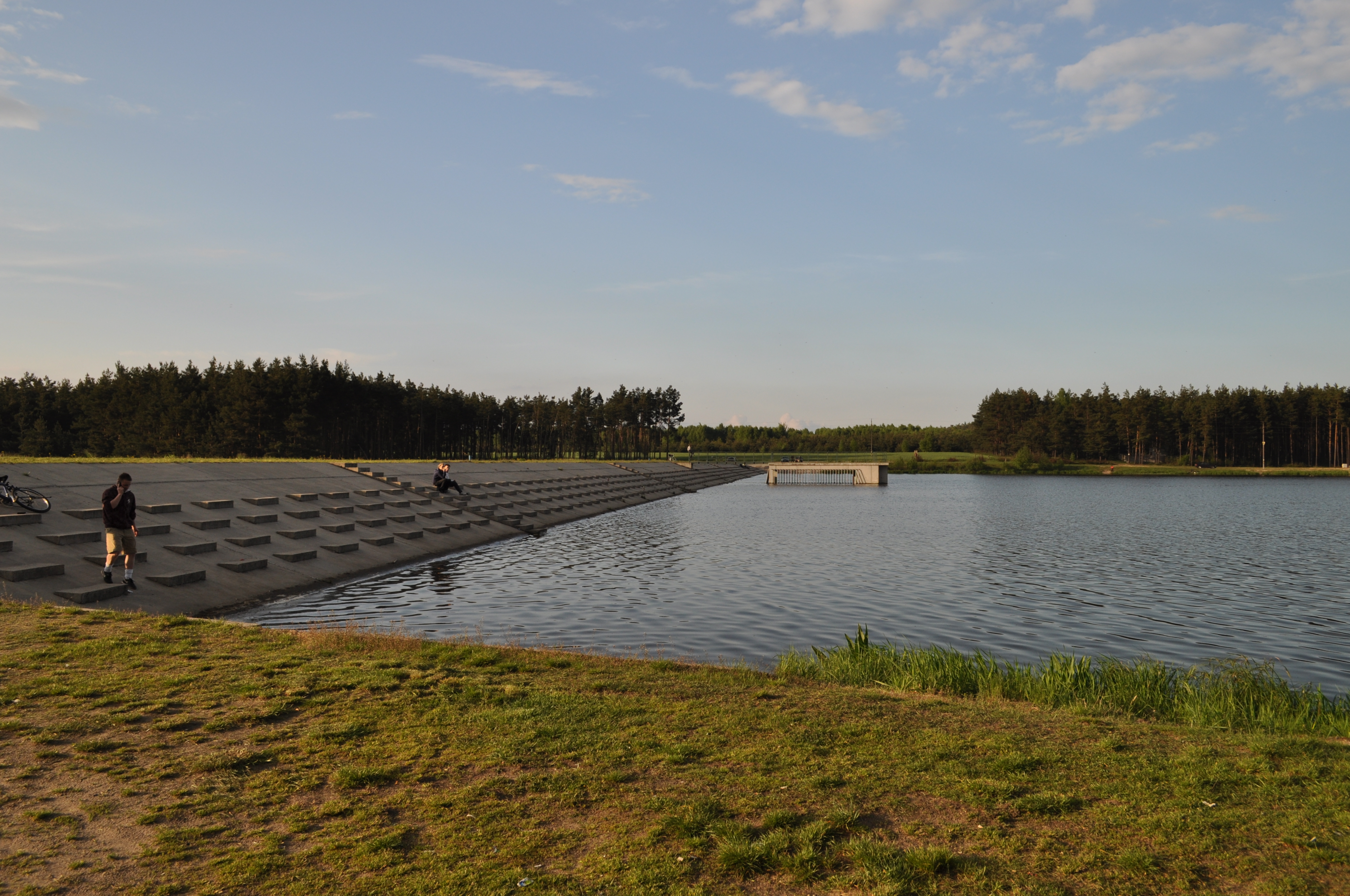 Tama zalewu w Ostrowach nad Okszą